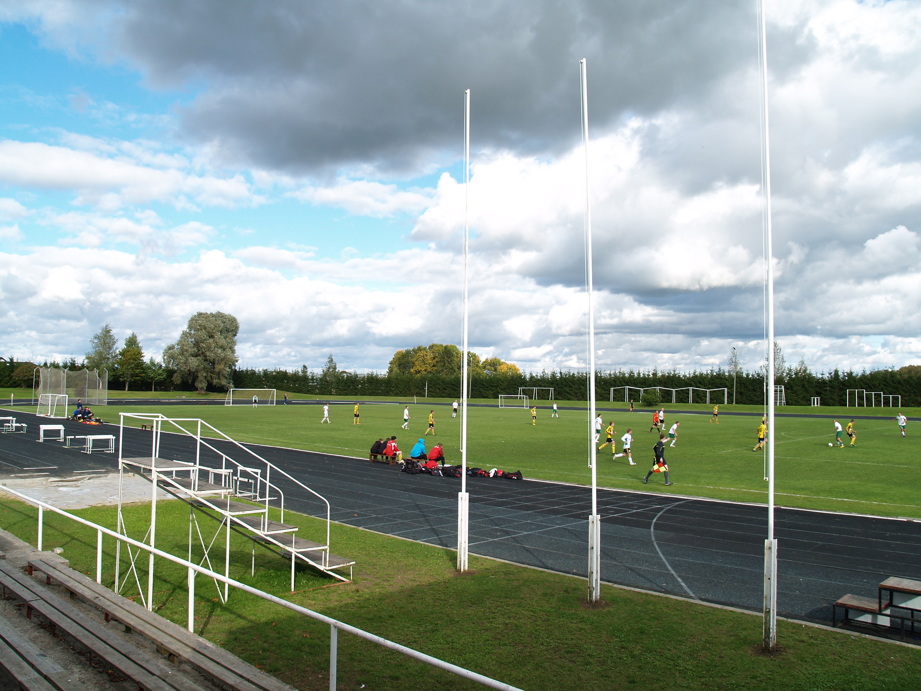 Ülenurme staadion